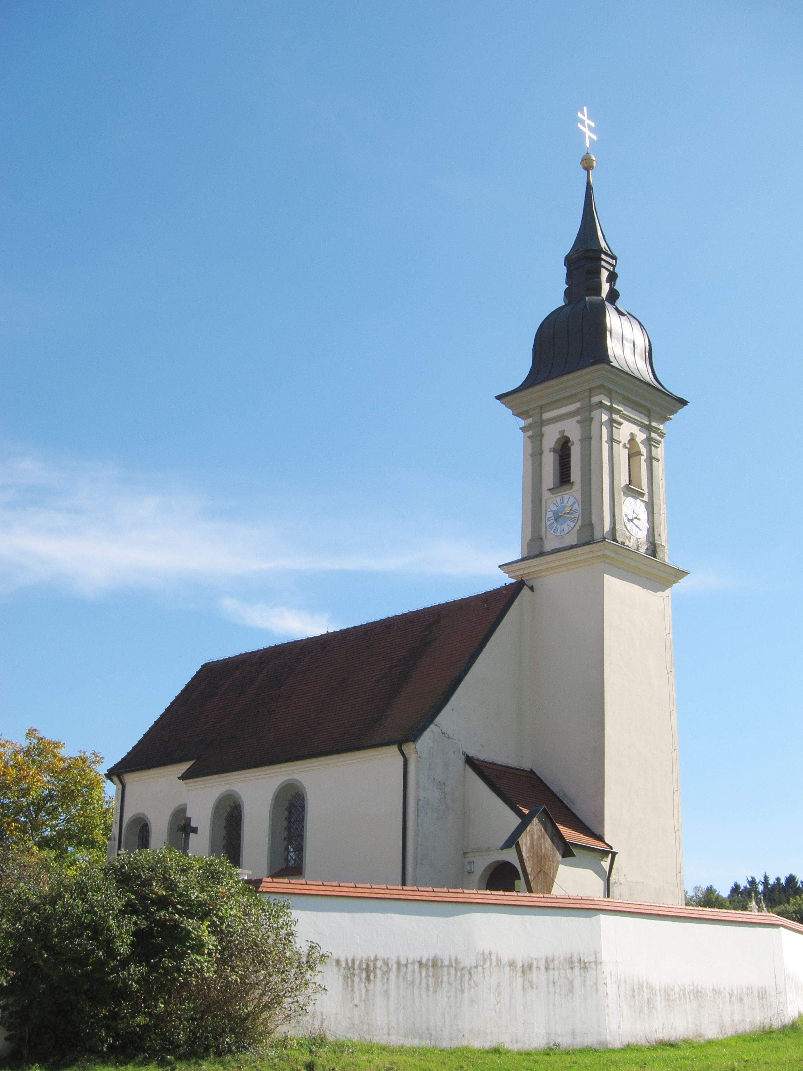 Eschlbach; kath. Pfarrkirche Mariae Geburt, barocke Saalkirche mit eingezogenem Chor und Zwiebelturm, im Kern spätgotisch, wesentlicher Umbau von Hans Kogler, 1679/80; mit Ausstattung.